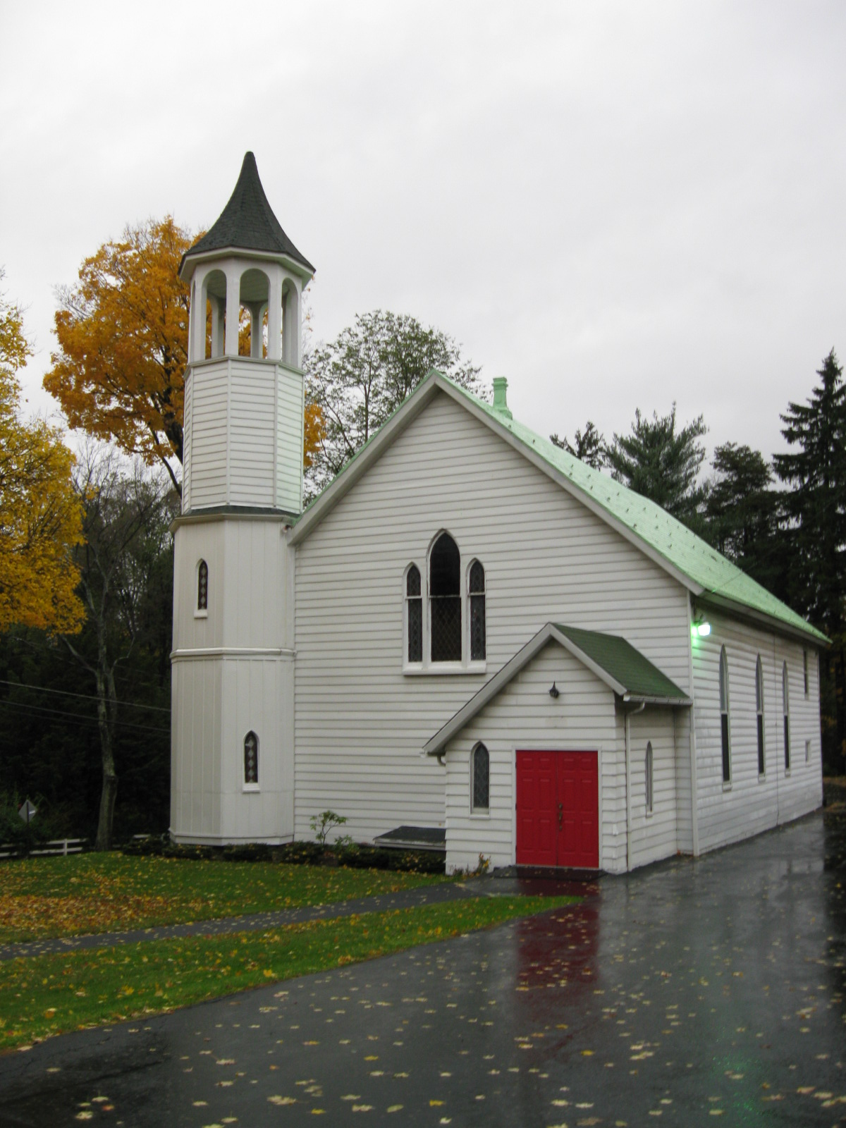 Waverly, Pennsylvania